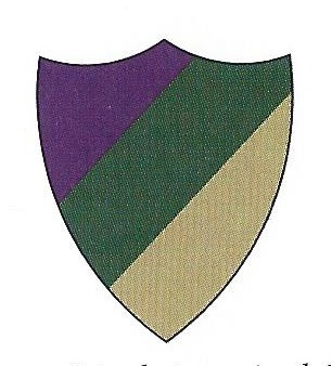 Farben der lettischen Damenverbindung Daugaviete